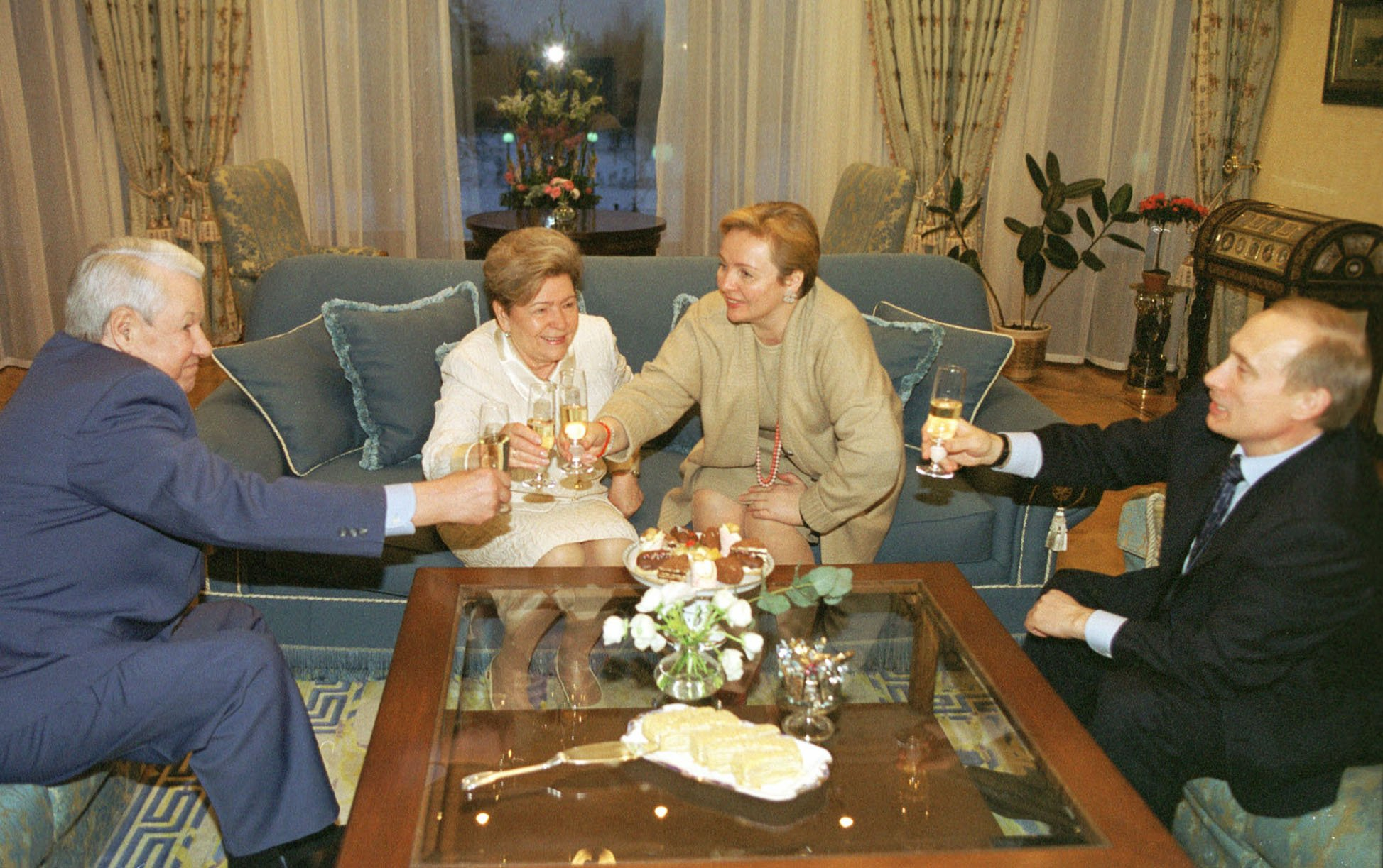 МОСКОВСКАЯ ОБЛАСТЬ, БАРВИХА. Владимир и Людмила Путины поздравили первого президента России Бориса Ельцина с днем рождения. С Борисом Ельциным и его супругой Наиной.